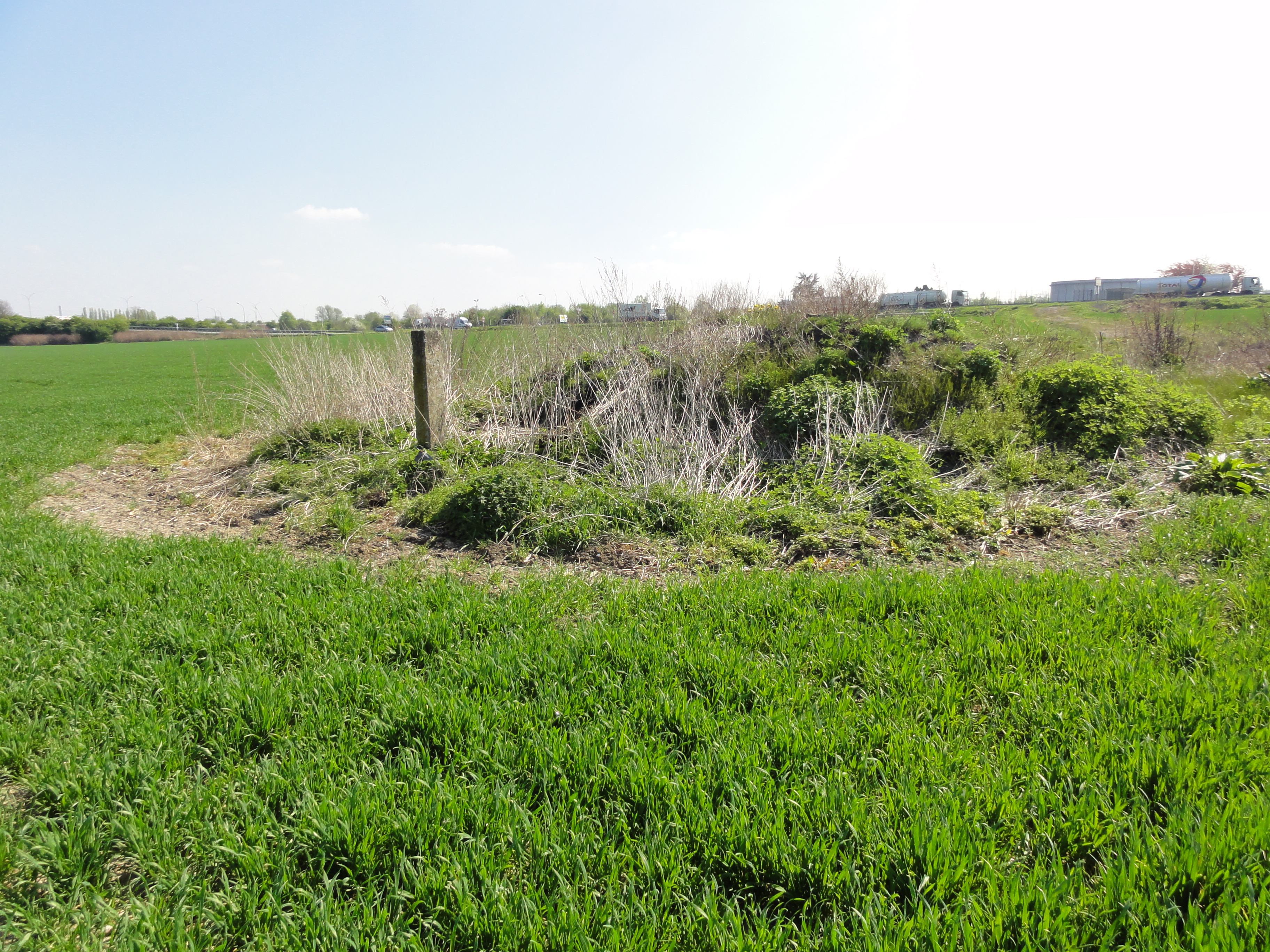 L'Avaleresse n° 10 de la Compagnie des mines de Douchy était un puits sans exploitation situé à Haulchin, Nord, Nord-Pas-de-Calais, France.